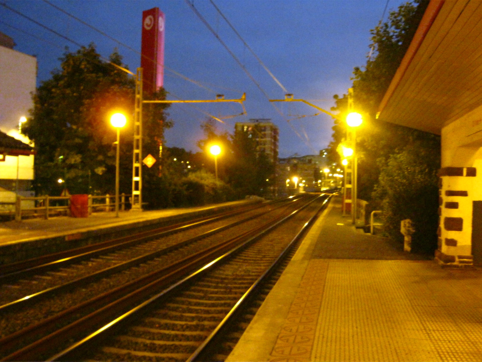 La estación de Herrera a la noche